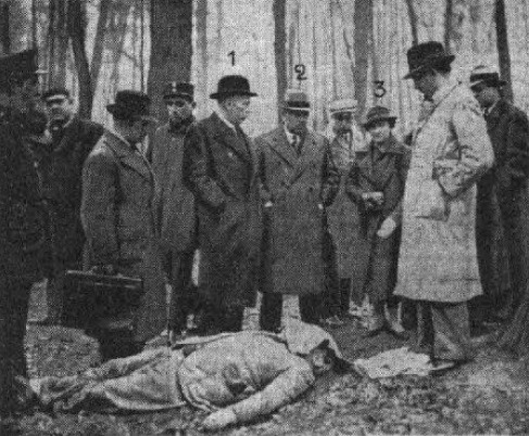 « Les premières constatations : MM. Guillaume (1), Moreux (2), et la cuisinière de la victime (3) ». Photographie du cadavre de Dimitri Navachine, publiée dans Le Petit Parisien, n° 21882, 26 janvier 1937.